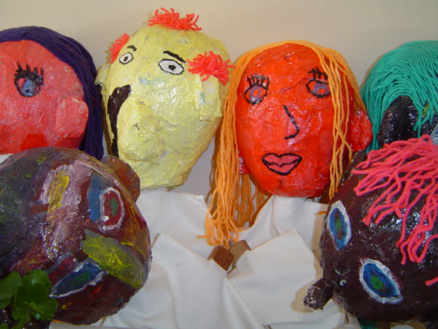 Cultura Popular,Cabeção em papel marche, Santana de Parnaíba, SP.Masks.